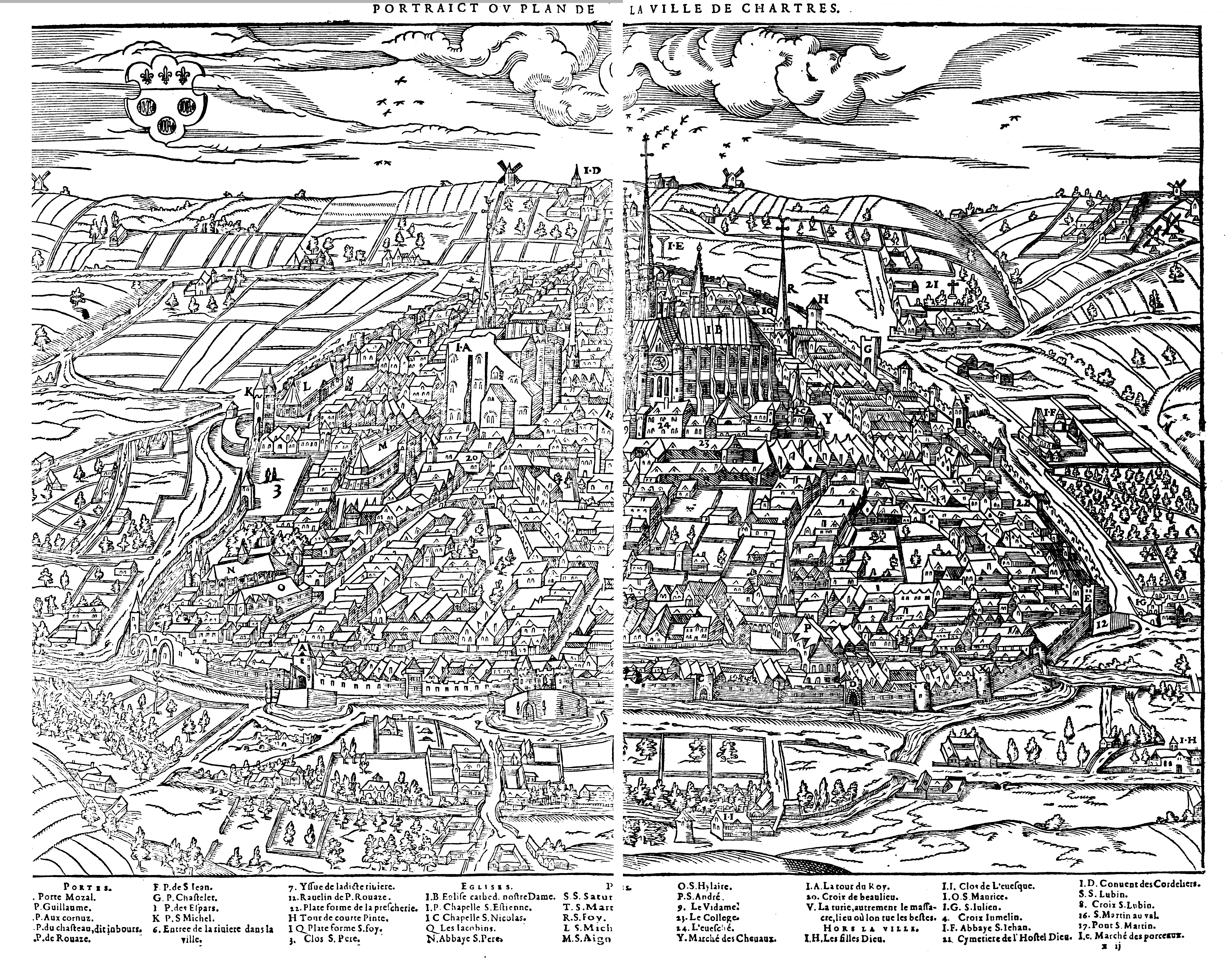 Cosmographie universelle 6